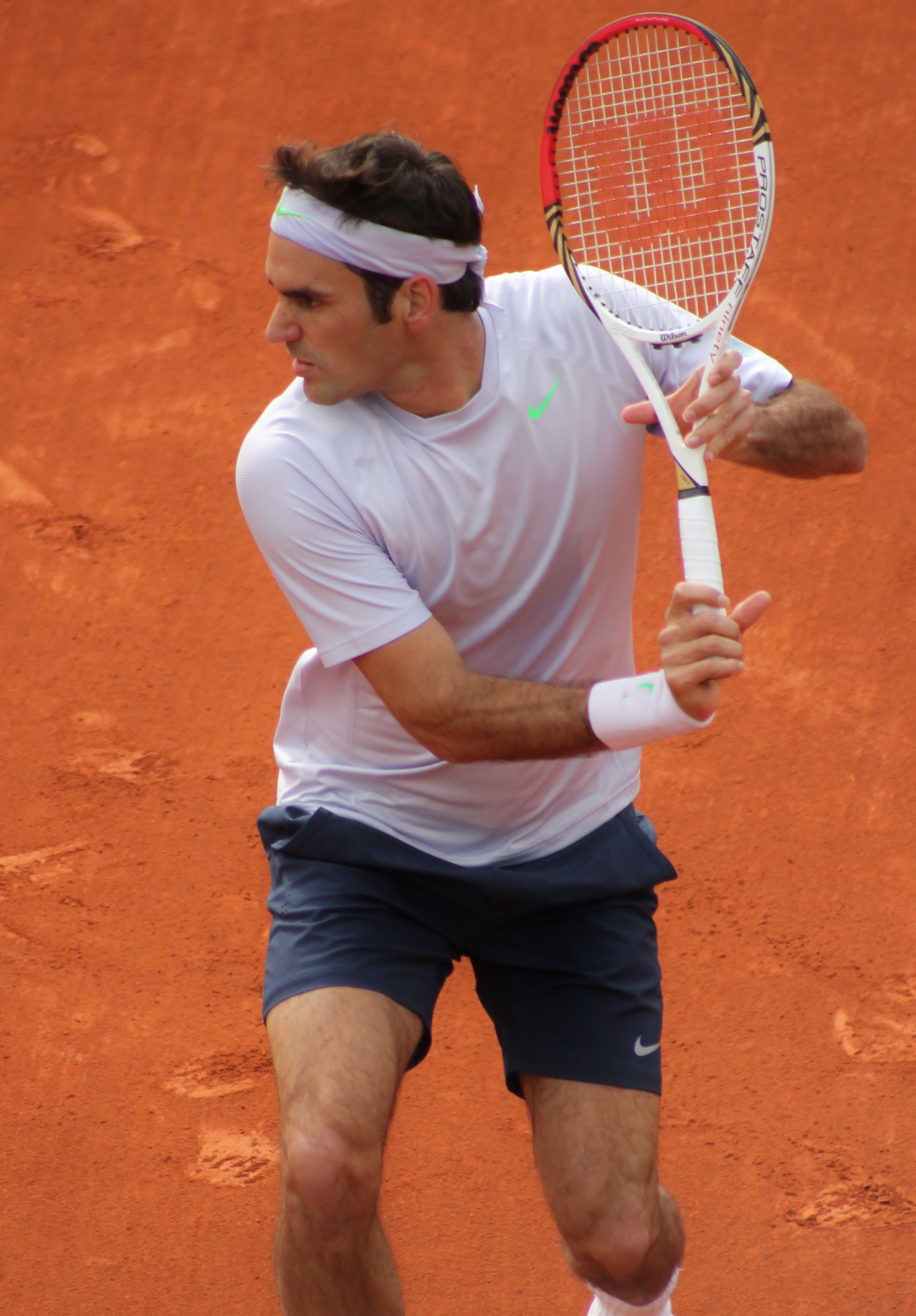 Federer RG13 (62)